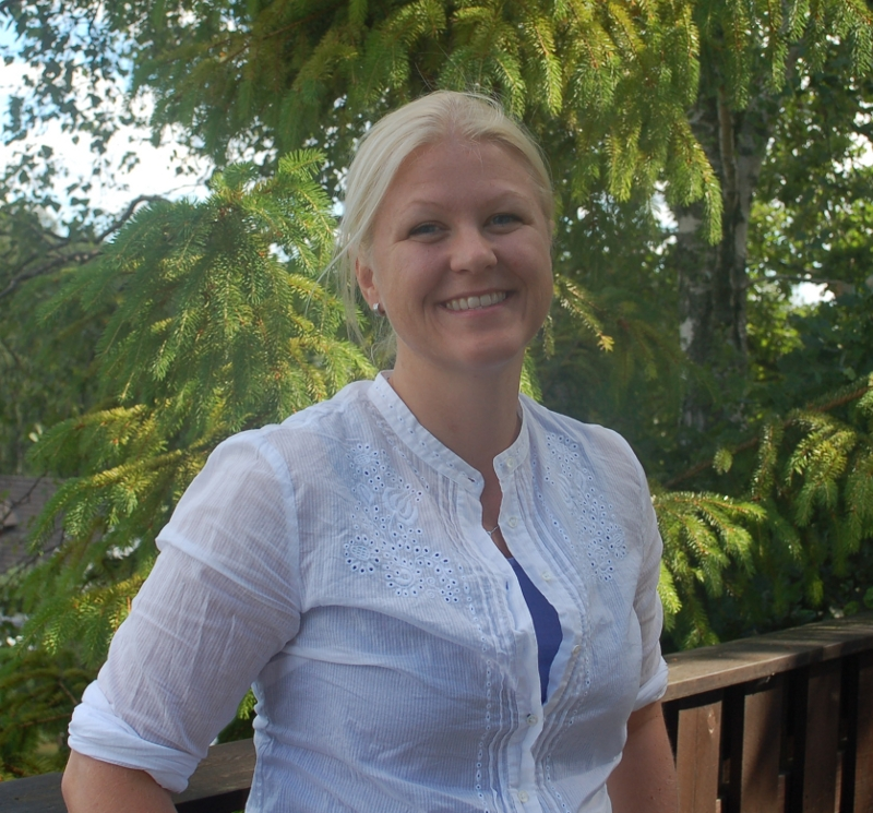 Riksdagsledamot Ulrika Karlsson på besök hos väljare i Sunnersta utanför Uppsala.